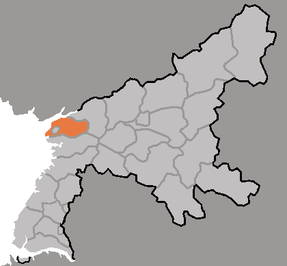 Map of Mundok, Pyongan-namdo, DPRK, 2006